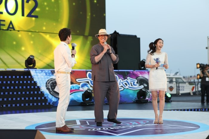 방송인 이참